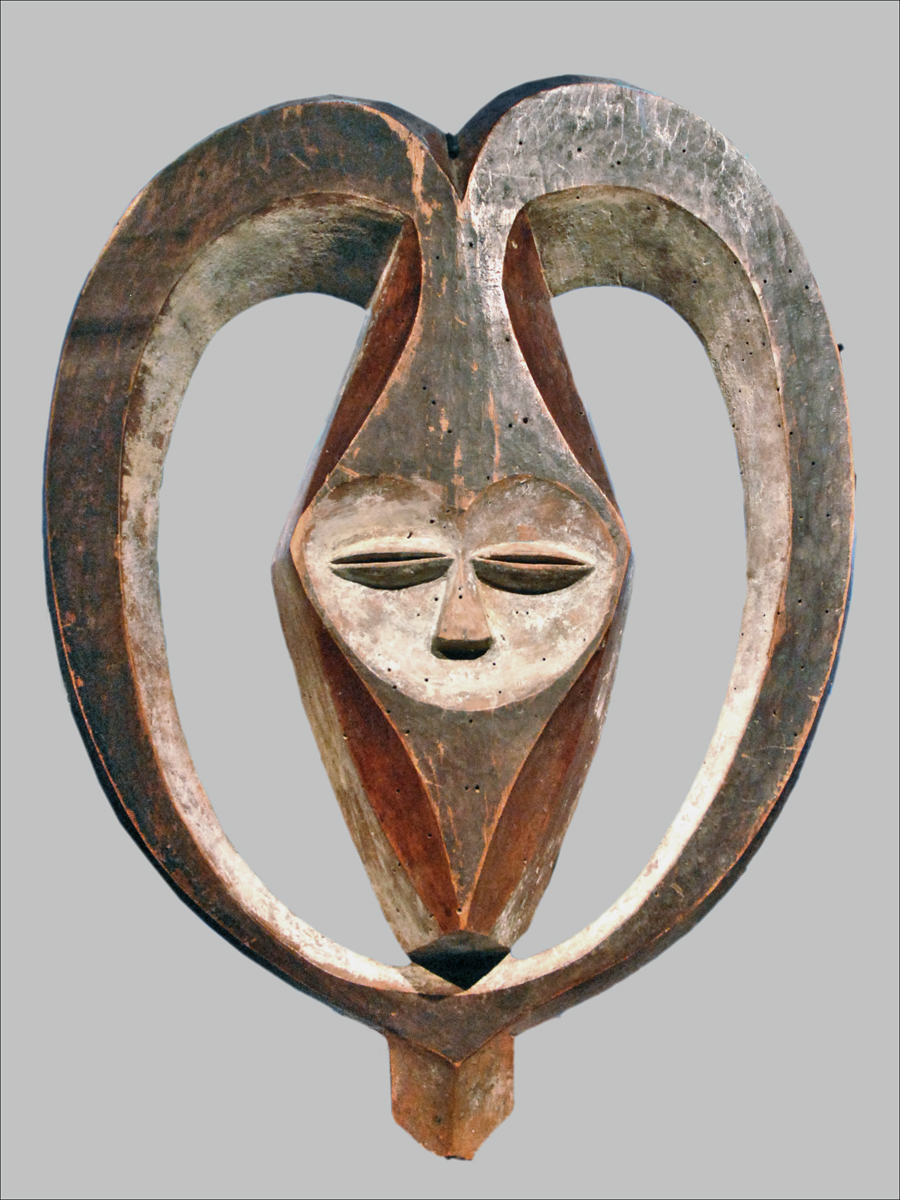 Masque facial anthropomorphe, enveloppé de cornes Kwele République du Congo bois, pigments Exposition Fleuve Congo Musée du quai Branly Ce masque appartient aux collections du musée, on trouve sa notice complète et sa photo dans le catalogue des objets sur le site web du musée.